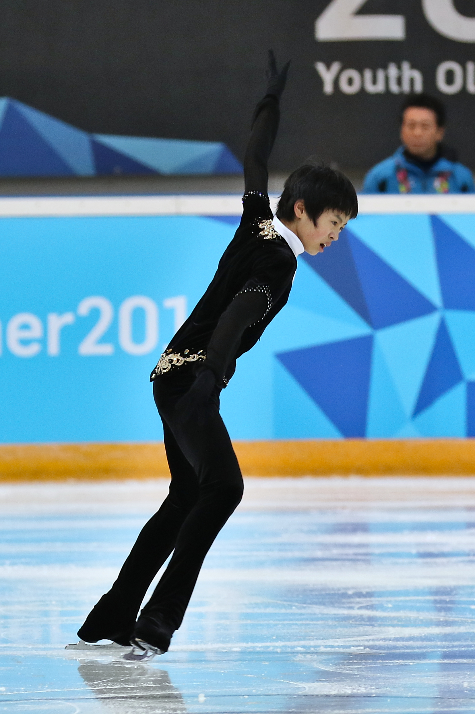 Lillehammer 2016 - Figure Skating Men Short Program - Koshiro Shimada